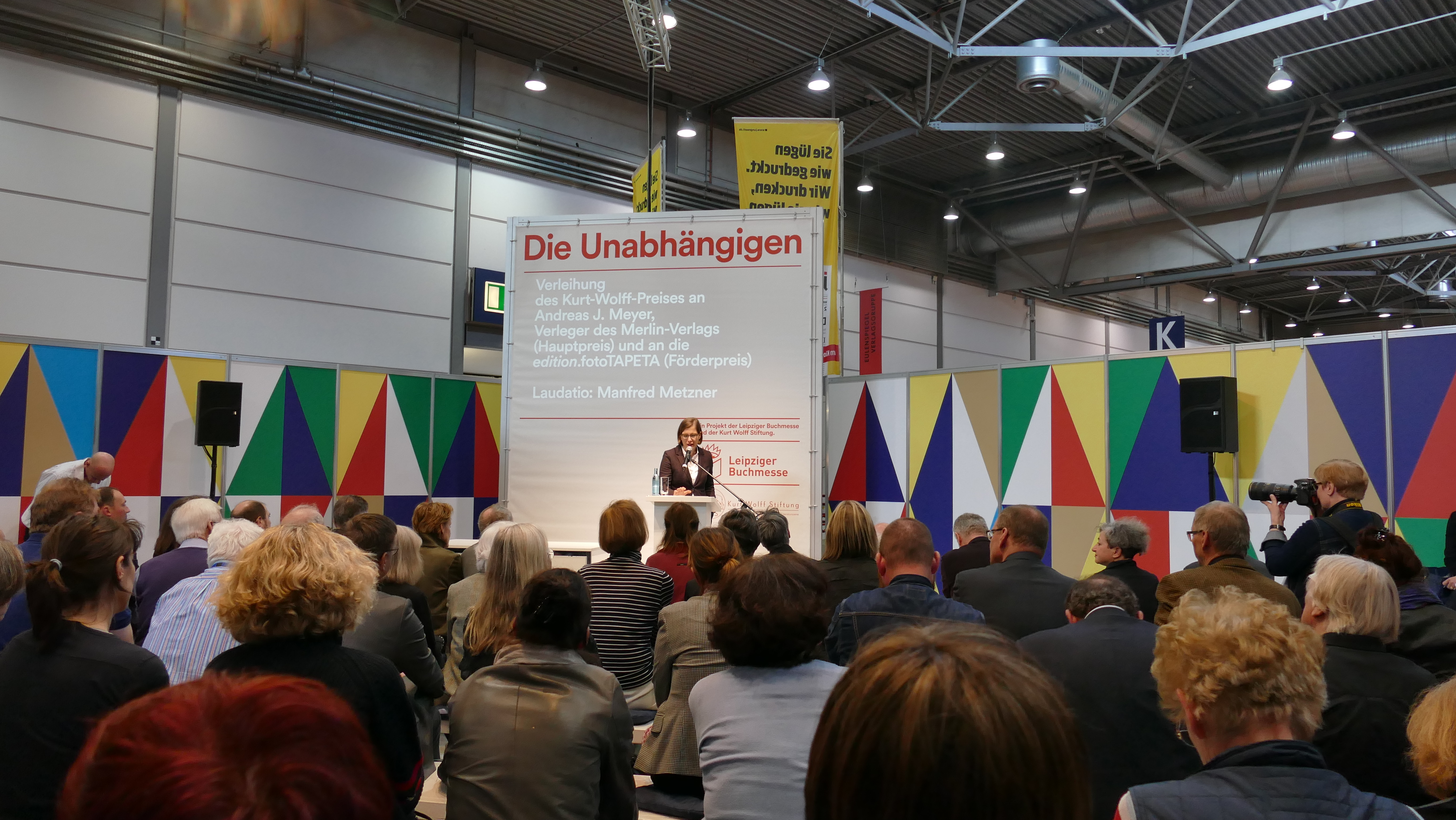 Britta Jürgs, Vorsitzende der Kurt Wolff Stiftung bei der Verleihung des Kurt Wolff-Preises 2019 an den Gründer des Merlin Verlages Andreas J. Meyer